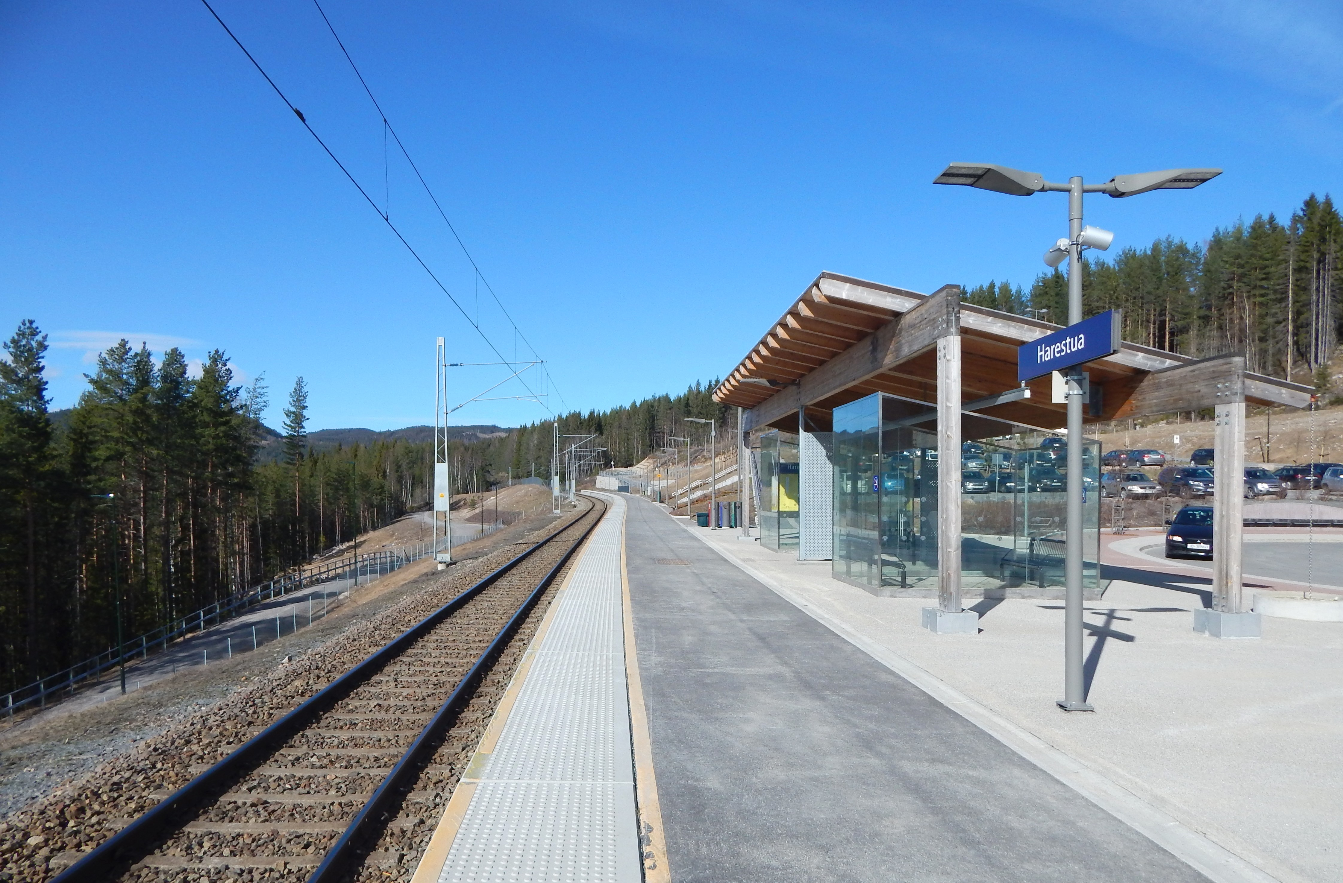 Harestua holdeplass på Gjøvikbanen